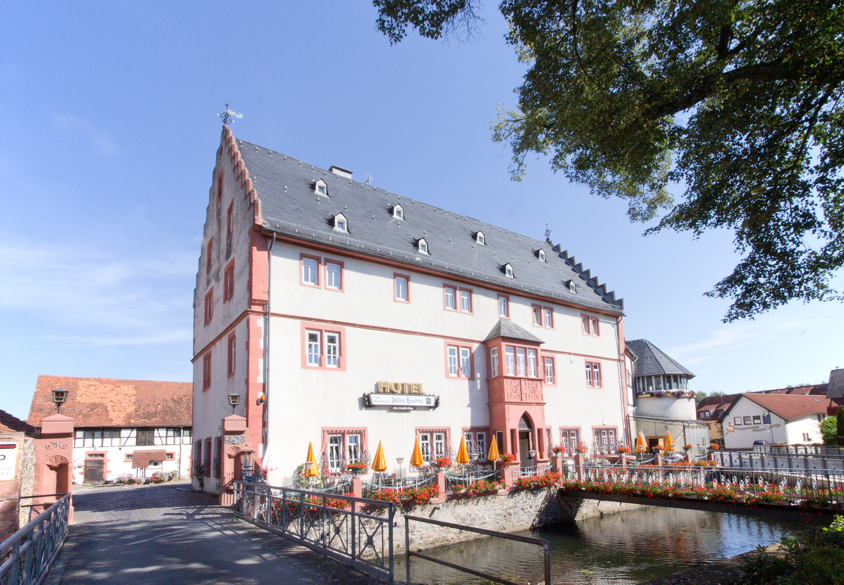 Schloss Ysenburg, Renaissancegebäude als Teil der Stadener Wasserburg in Florstadt-Staden.